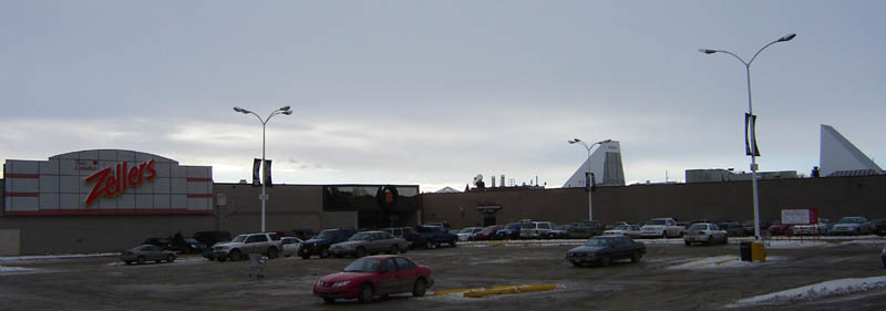 Market Mall Shopping Mall, Nutana Suburban Centre, Nutana Suburban Development Area, Saskatoon, Saskatchewan, Canada